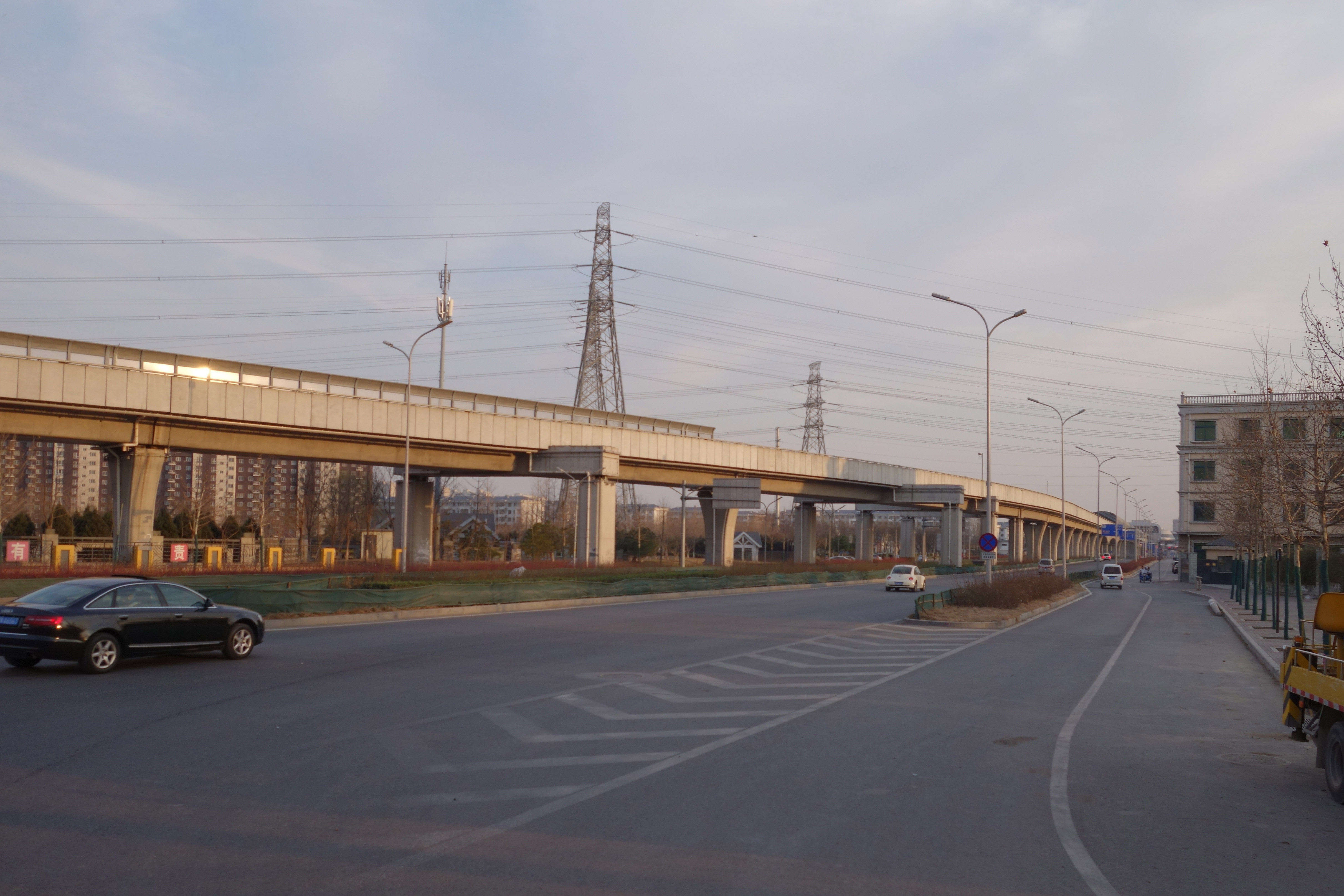 大兴线高架段